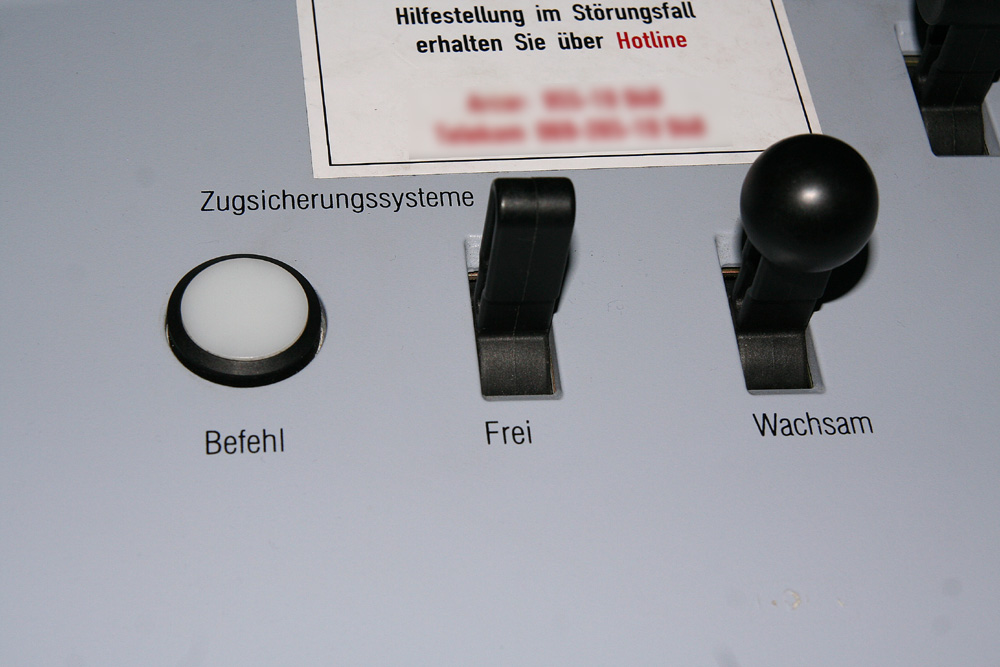 Die PZB-Einrichtung eines ICE-T